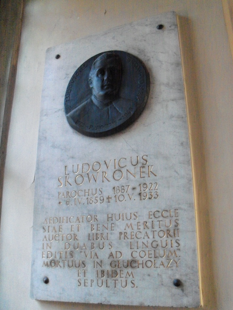 Tablica pamiątkowa w kościele pw. św. Szczepana w Katowicach-Bogucicach, poświęcona Ludwikowi Skowronkowi